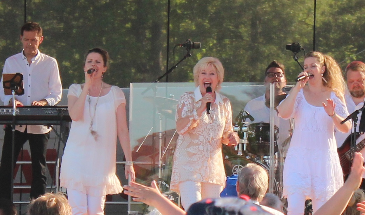 Birthe Kjær under Danmark Dejligst på Middelaldercentret d. 27. maj 2017.